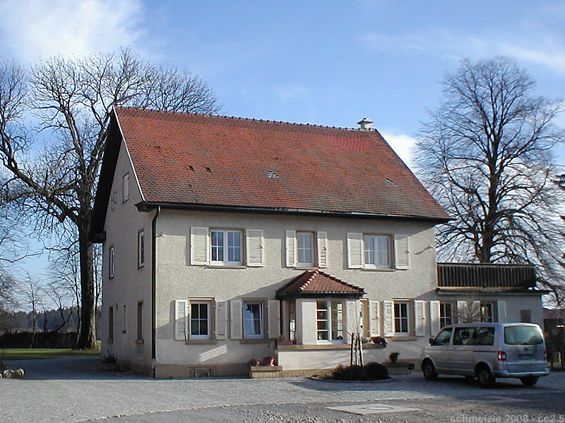 Hauptgebäude im Eichhäuser Hof bei Bad Rappenau Bonfeld, ehemalige Hofanlage der Freiherren von Gemmingen